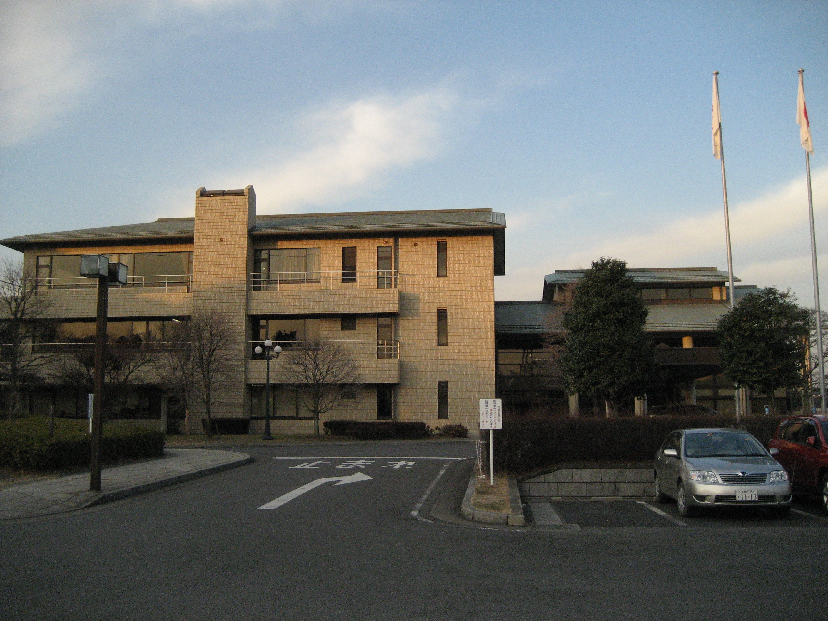 蓮田市役所